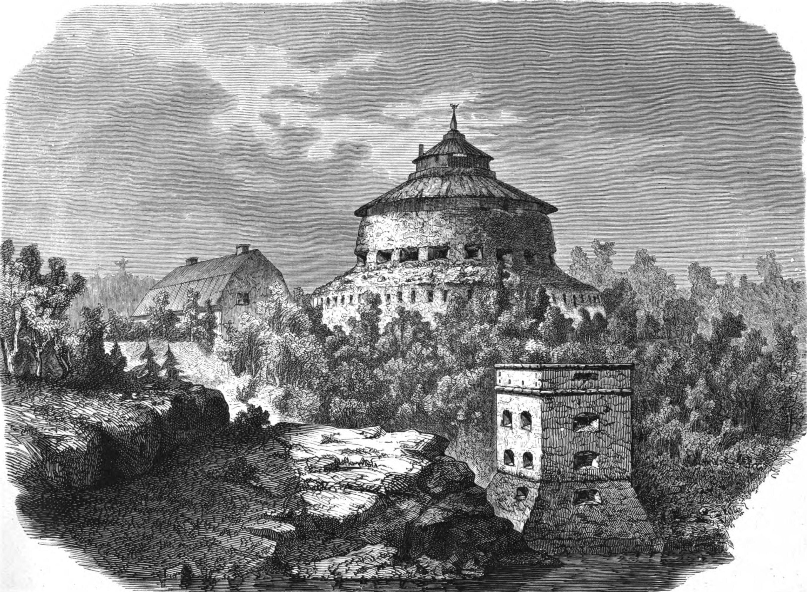 Fästningen Fredriksborg i Värmdö.